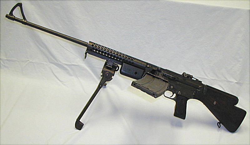 Foto tirada em visita amo museu do exército forte das cinco pontas.